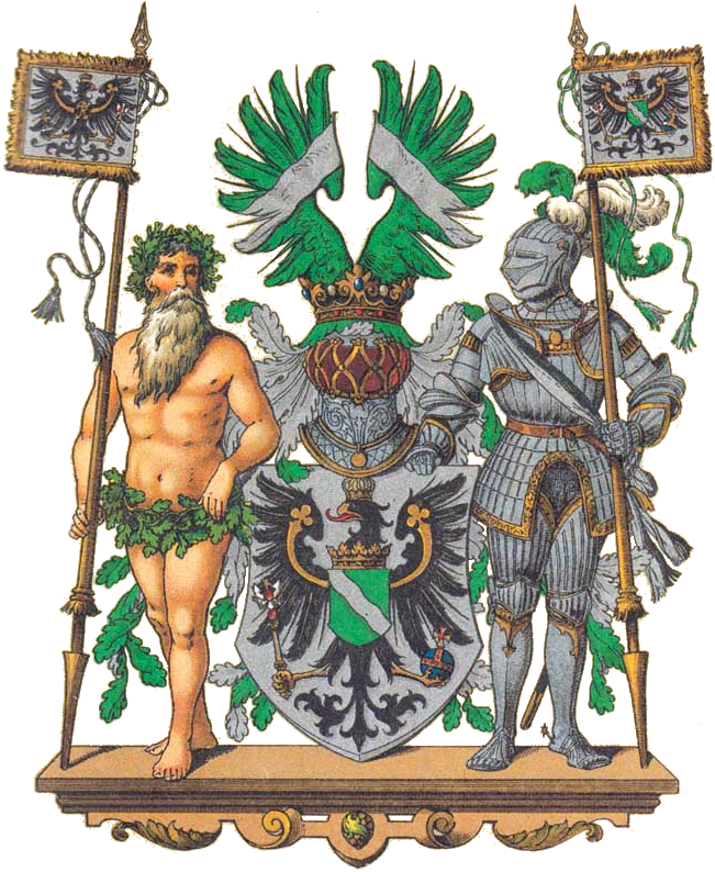 Provinz Rheinland.